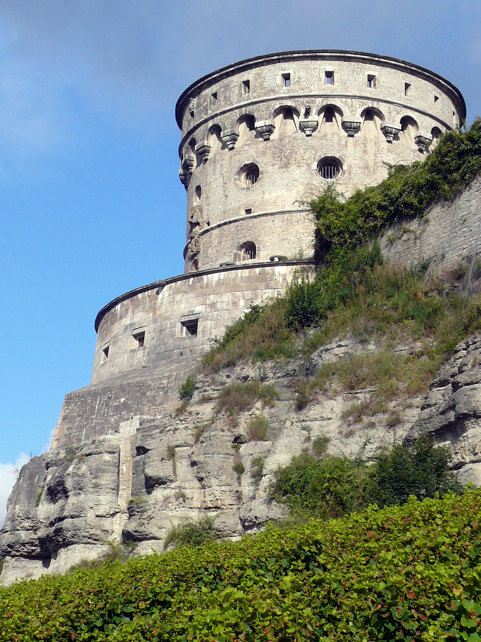 Maschikuliturm, Geschützturm der Festung Marienberg